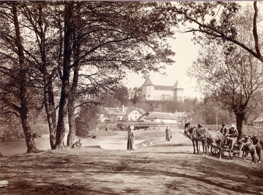 Kemény-kastély. Marosvécs, az 1890-as évek.